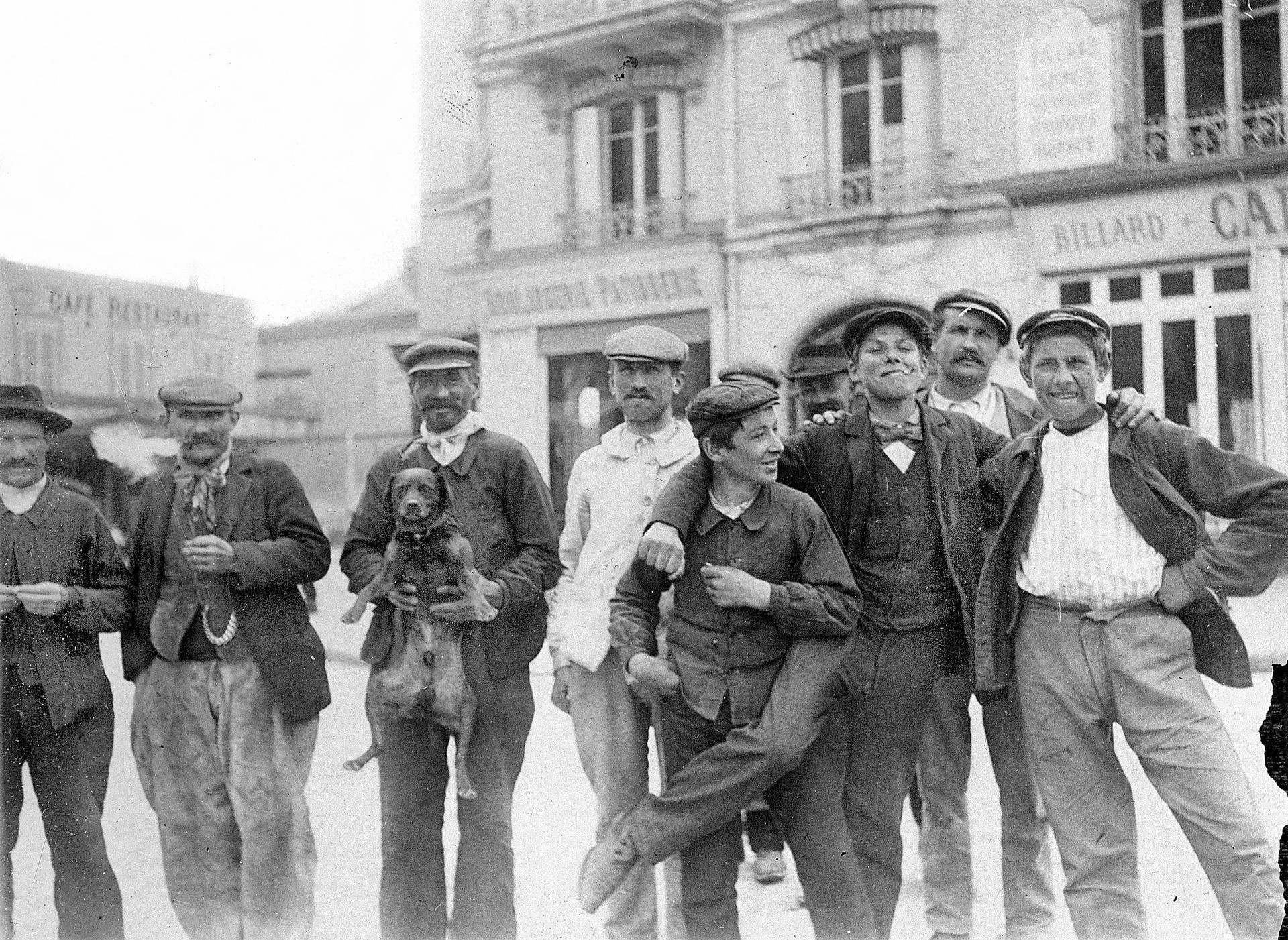 Types de joyeux ou apaches vers 1900, photo Roger-Viollet.